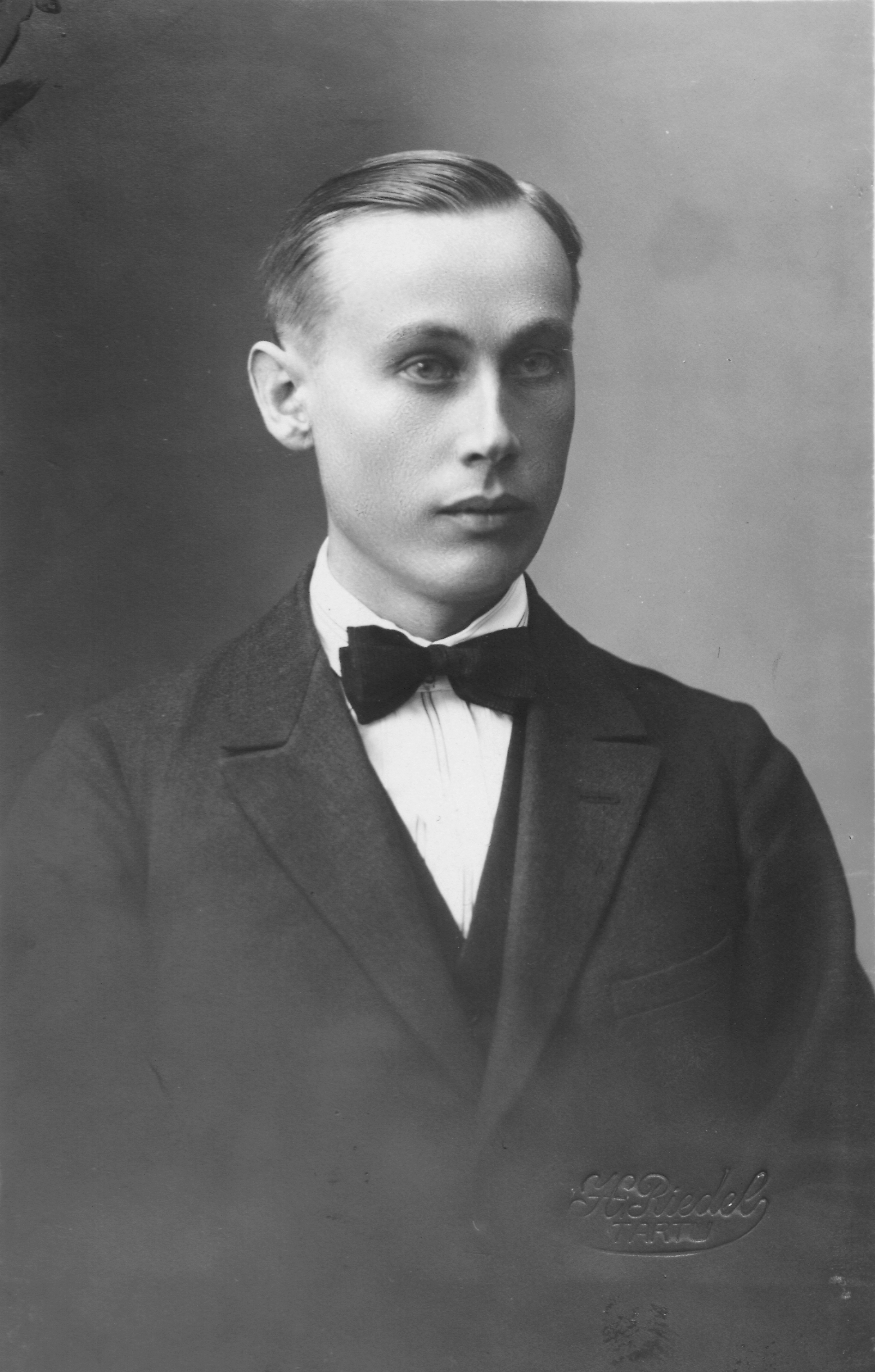 August Tammekann